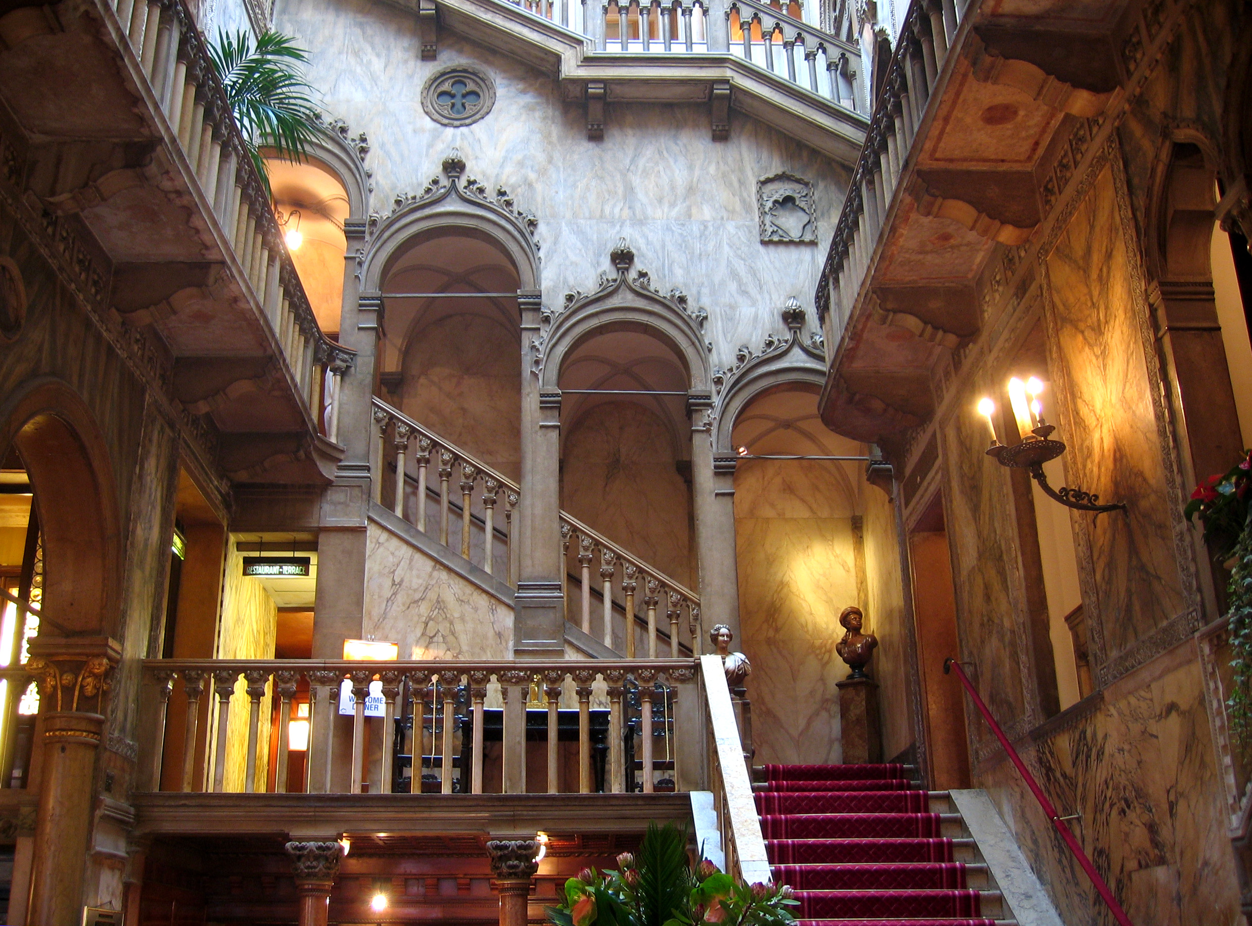 Danieli hotel in Venice. More pictures at